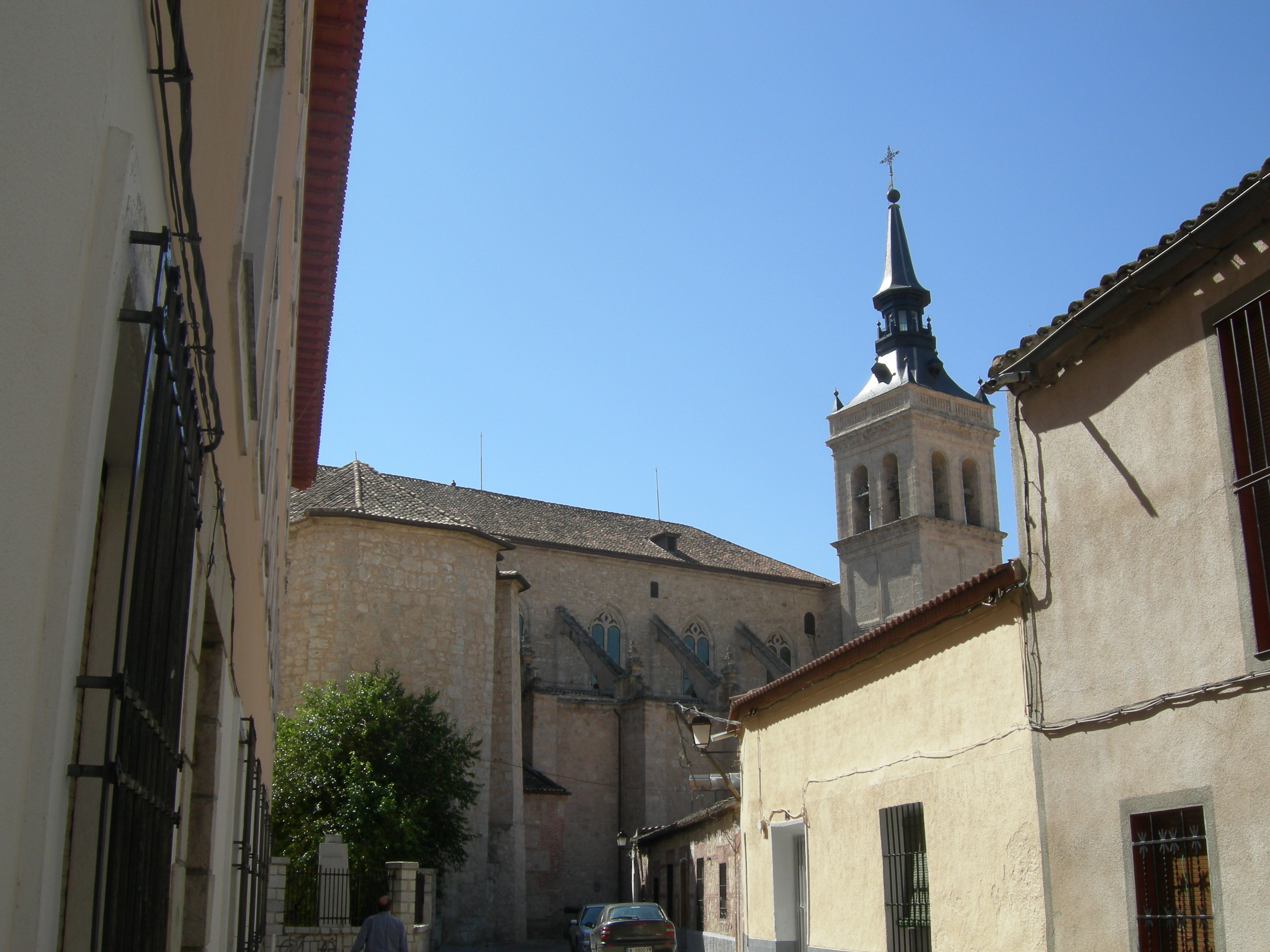 Vista de la Colegiata desde el Callejón de los Ingenios